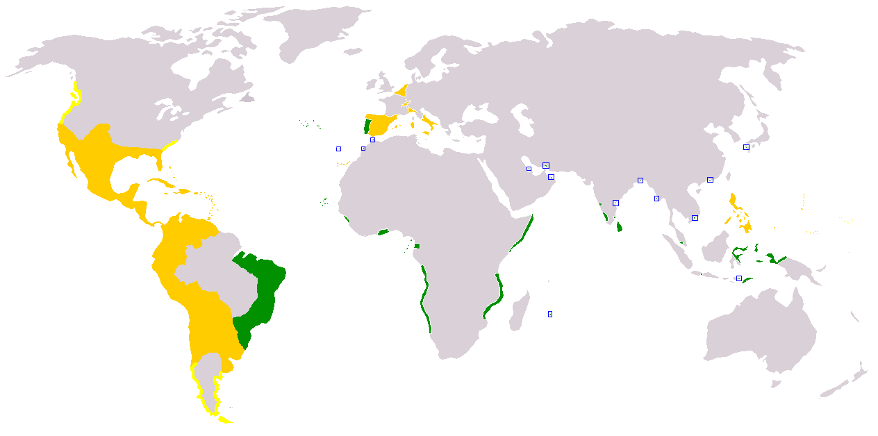 Spanisch-Portugiesische Personalunion im Jahr 1600